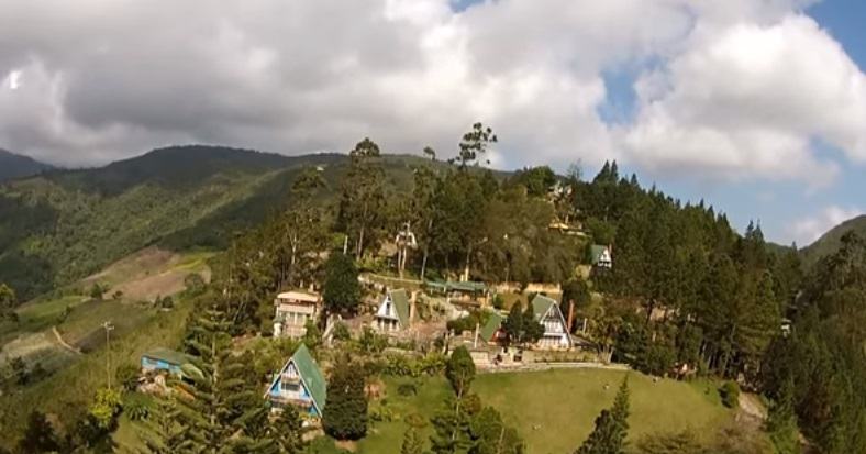 Guayamura, Lara